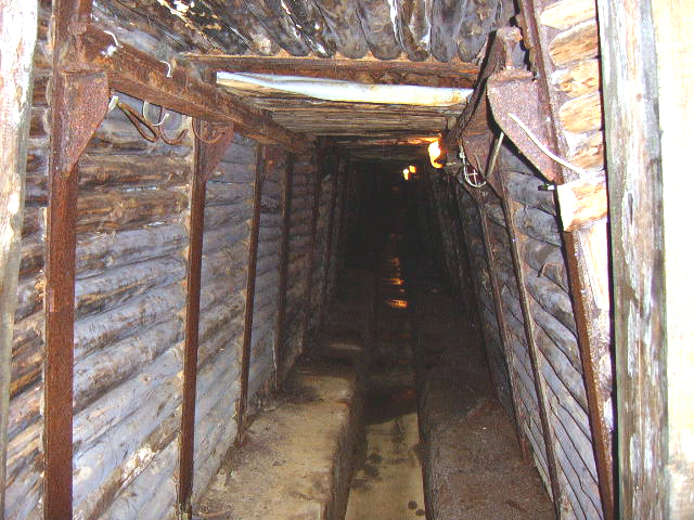 Stahlausbau mit dichtem Verzug an einer stark druckbelasteten und nachfallgefährdeten Stelle in der Grube Glasebach. In der Mitte der Streckensohle befindet sich eine Wasserrösche zur Ableitung von Grubenwasser.